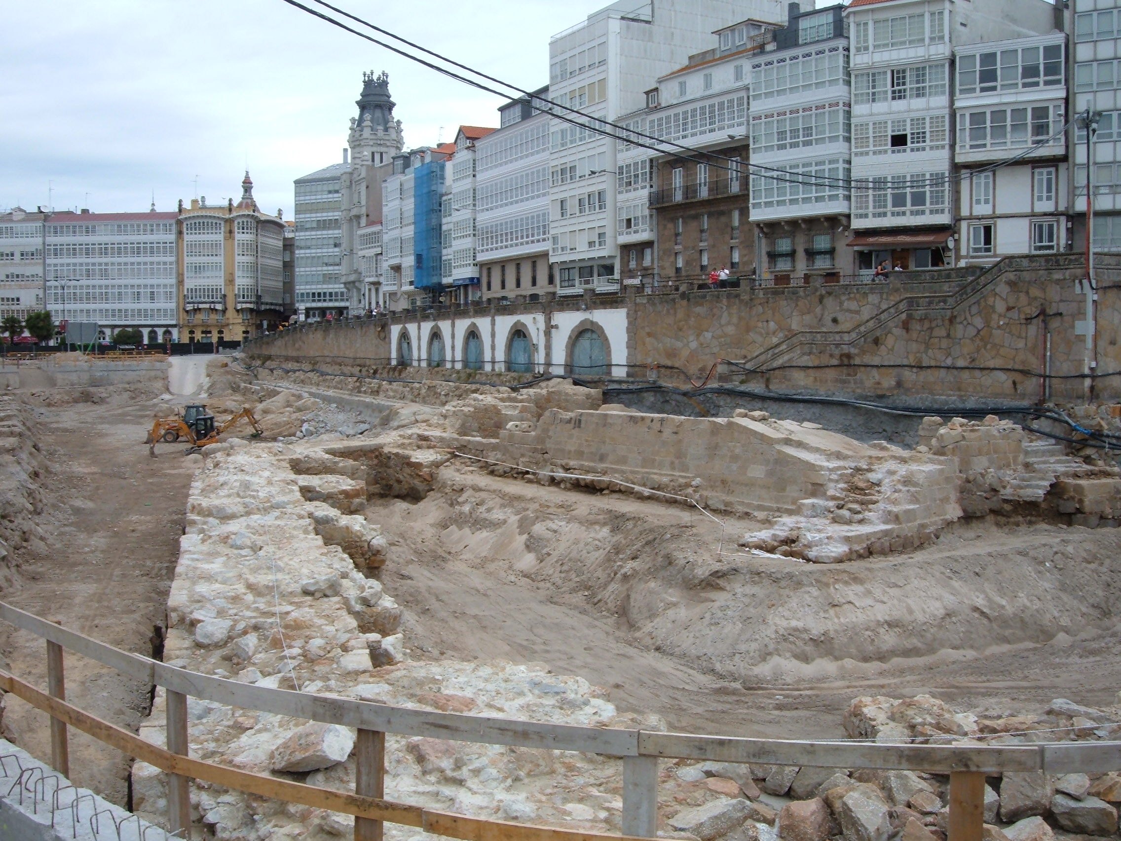 Baluarte hallado con durante la construcción del aparcamiento del Parrote en A Coruña